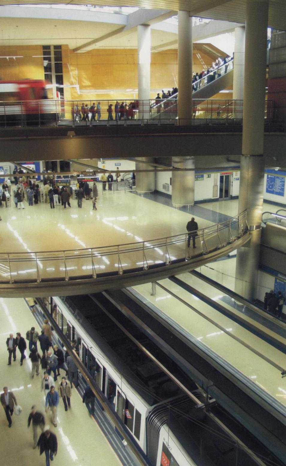 Interior del intercambiador de Metro y Cercanías (tren) de Getafe Central (Comunidad de Madrid, España).